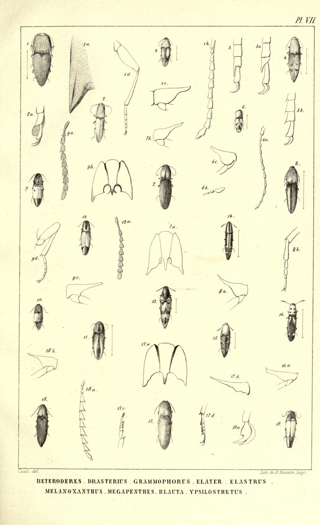 Mémoires de la Société royale des sciences de Liège Page 565 Liège: Chez H. Dessain, Impremieur 1859 Monographie des Élatérides par M. E. Candèze Pl. VII fig. 9 = Elater quadrisignatus fig. 10 = Elater lecontii fig. 11 = Elater savi